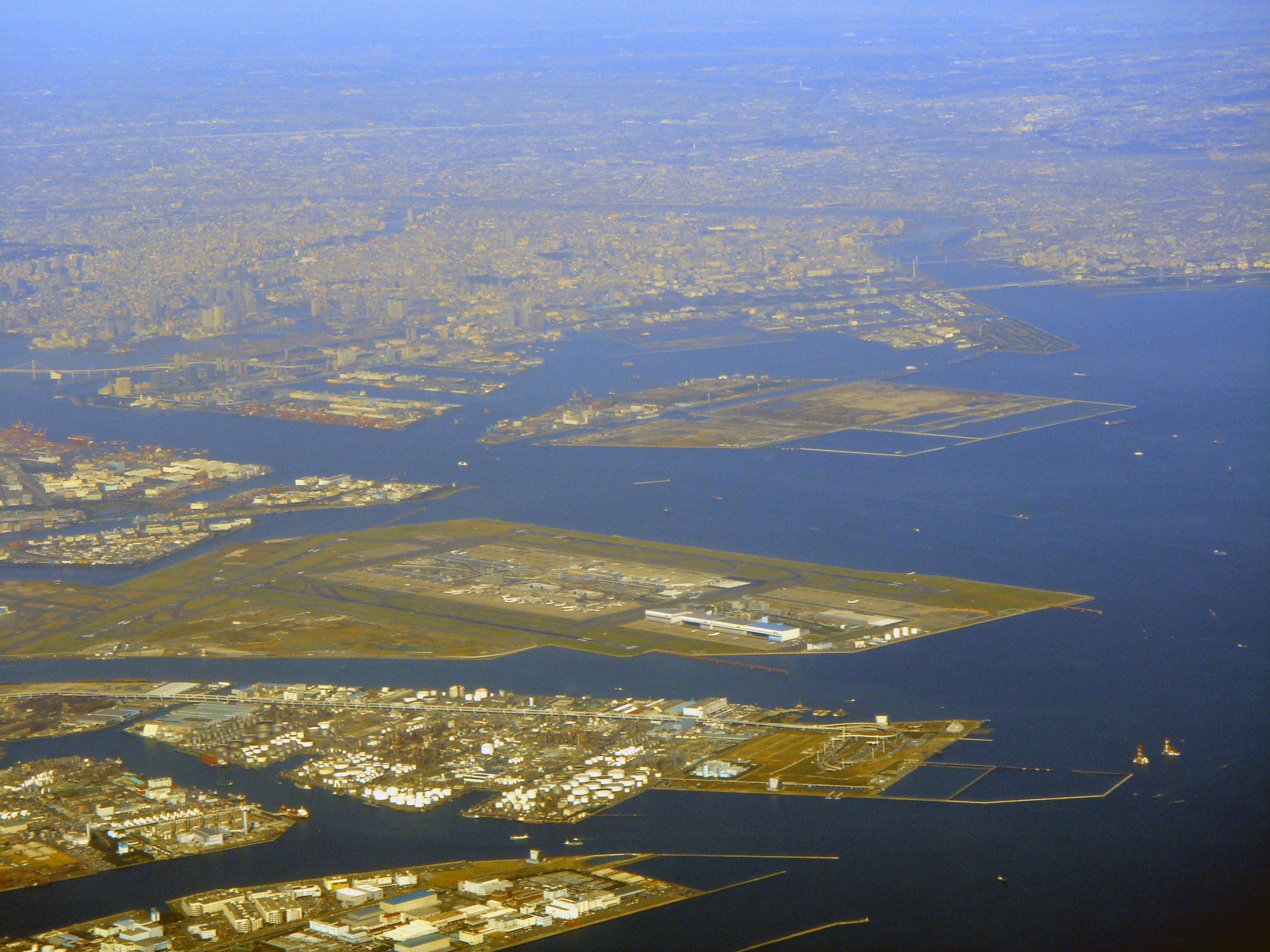 東京国際空港（羽田空港）空撮